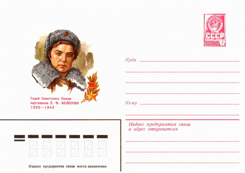 Художественные маркированные конверты 1981 года.